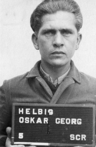 Haftbogenfoto des Angeklagten Oscar Georg Helbig (23.05.1911 - ?), SS-Oberscharführer im Konzentrationslager Mittelbau-Dora, im Dachauer Dora-Prozess ("Case No. 000-50-37 Dora") am 30.12.1947 zu 20 Jahren Haft verurteilt.